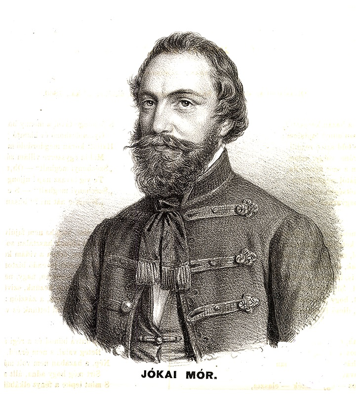 Ásvai Jókai Móric (Komárom, 1825. február 18. – Budapest, Erzsébetváros, 1904. május 5.[1]) regényíró, a „nagy magyar mesemondó”, országgyűlési képviselő, főrendiházi tag, a Magyar Tudományos Akadémia igazgató-tanácsának tagja, a Szent István-rend lovagja, a Kisfaludy Társaság tagja, a Petőfi Társaság elnöke, a Dugonics Társaság tiszteletbeli tagja.